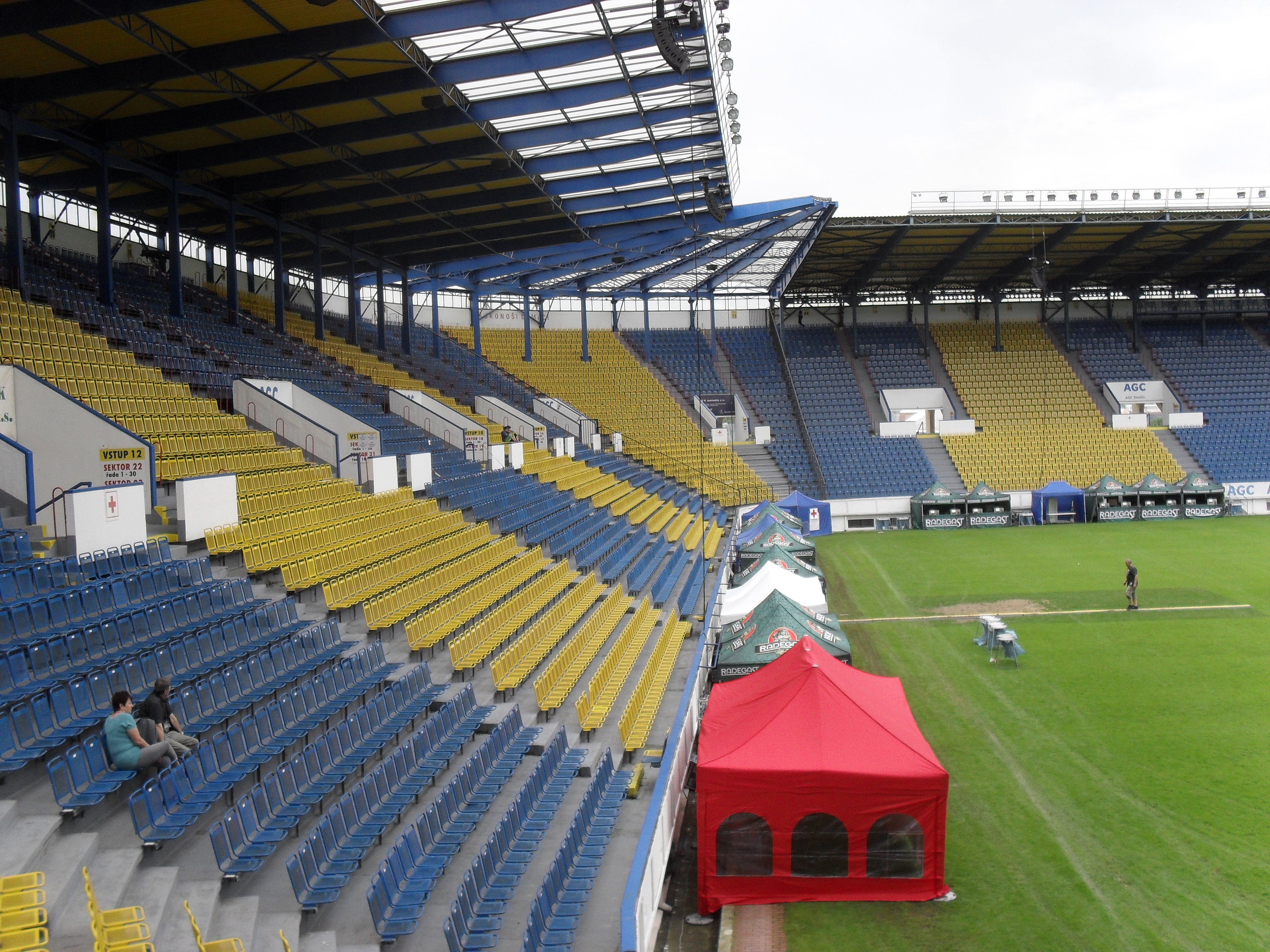 Teplický fotbalový stadión, 8. června 2013 zde proběhl koncert skupiny Kabát.